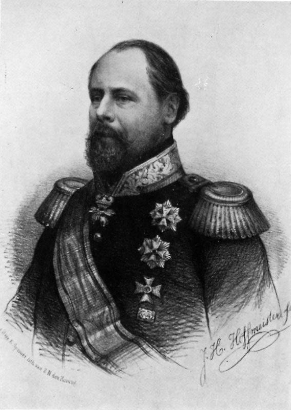 Willem III der Nederlanden door J.H. Hoffmeister - te oud voor copyright